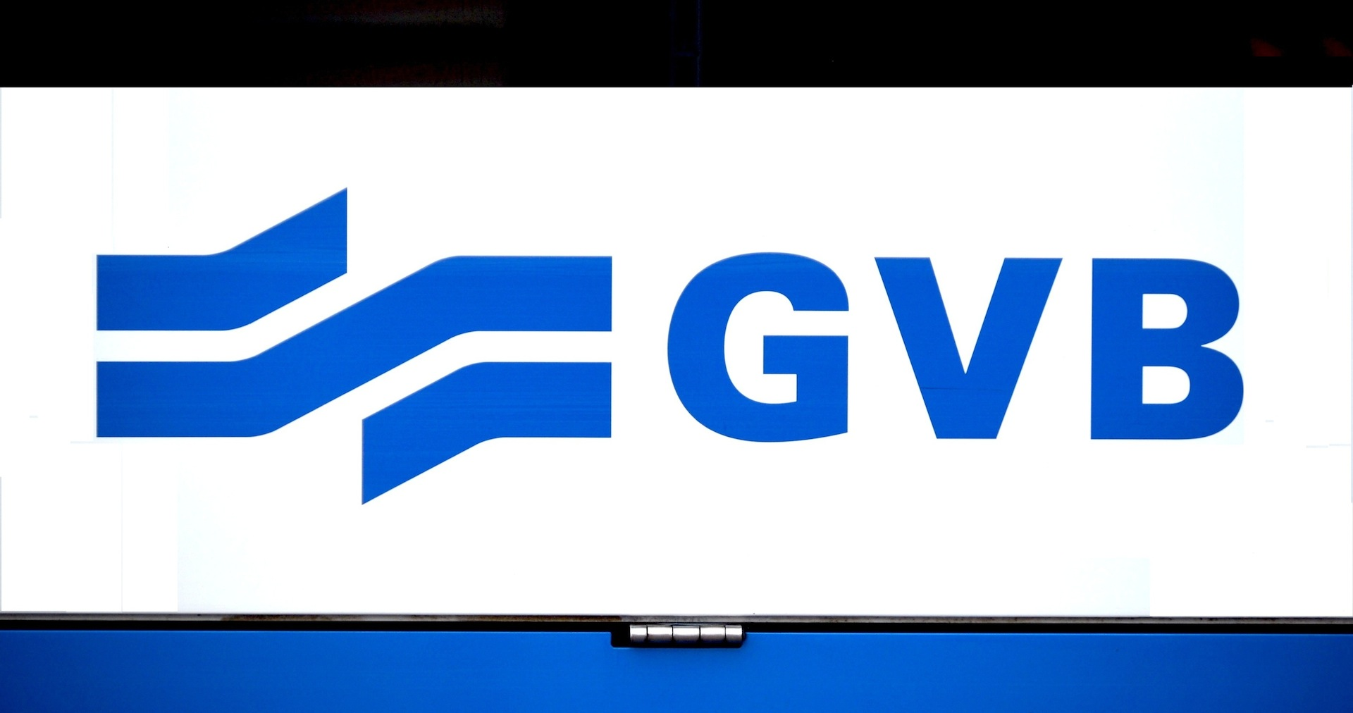 Logo GVB op Combino. Foto: Erik Swierstra.